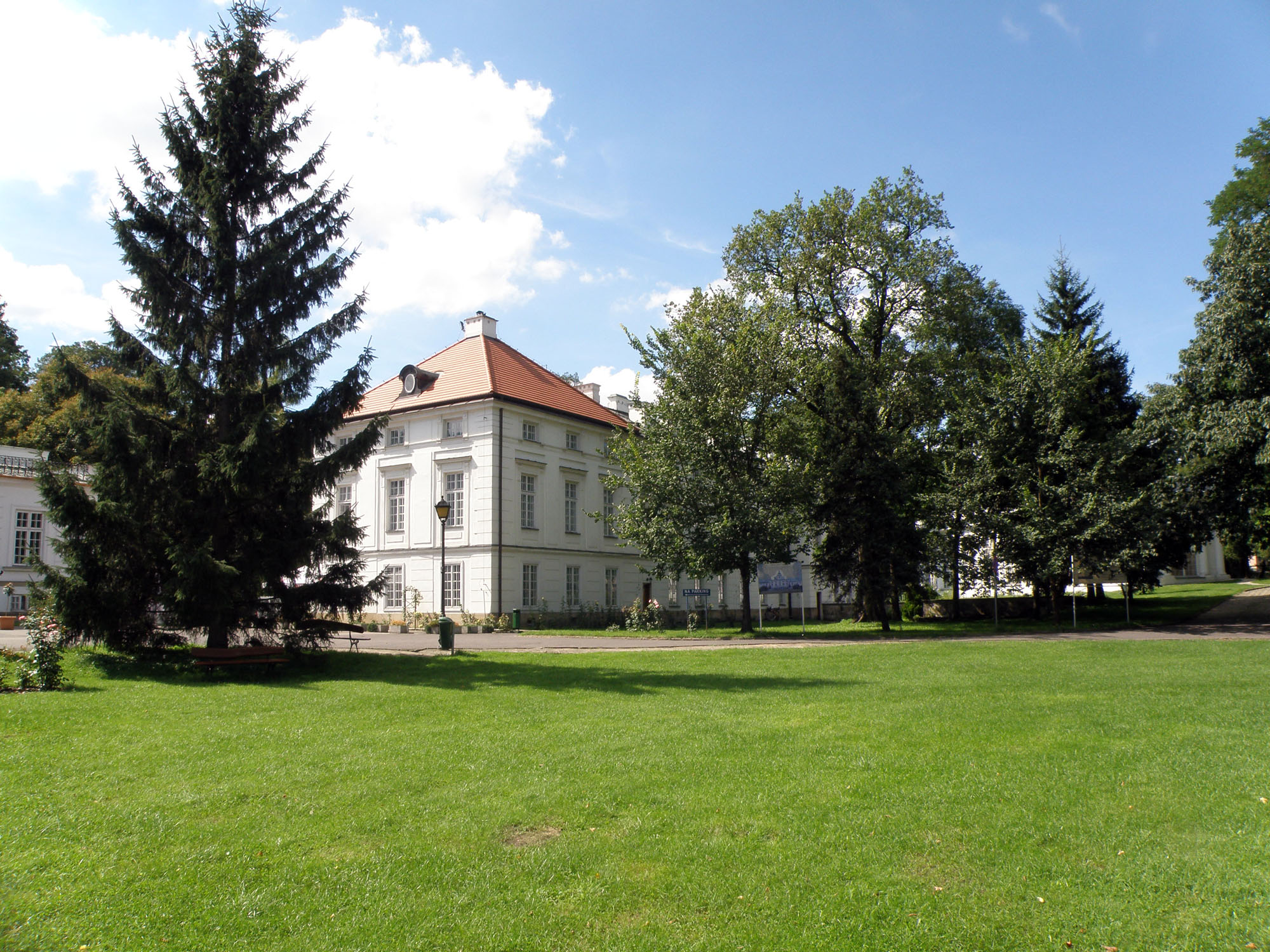 Dom Zjazdów i Konferencji Polskiej Akademii Nauk - Pałac w Jabłonnie, 05-110 Jabłonna, ul. Modlińska 105